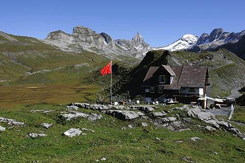 Berggasthaus auf der Glattalp mit Sicht zum Höch Turm und Ortstock